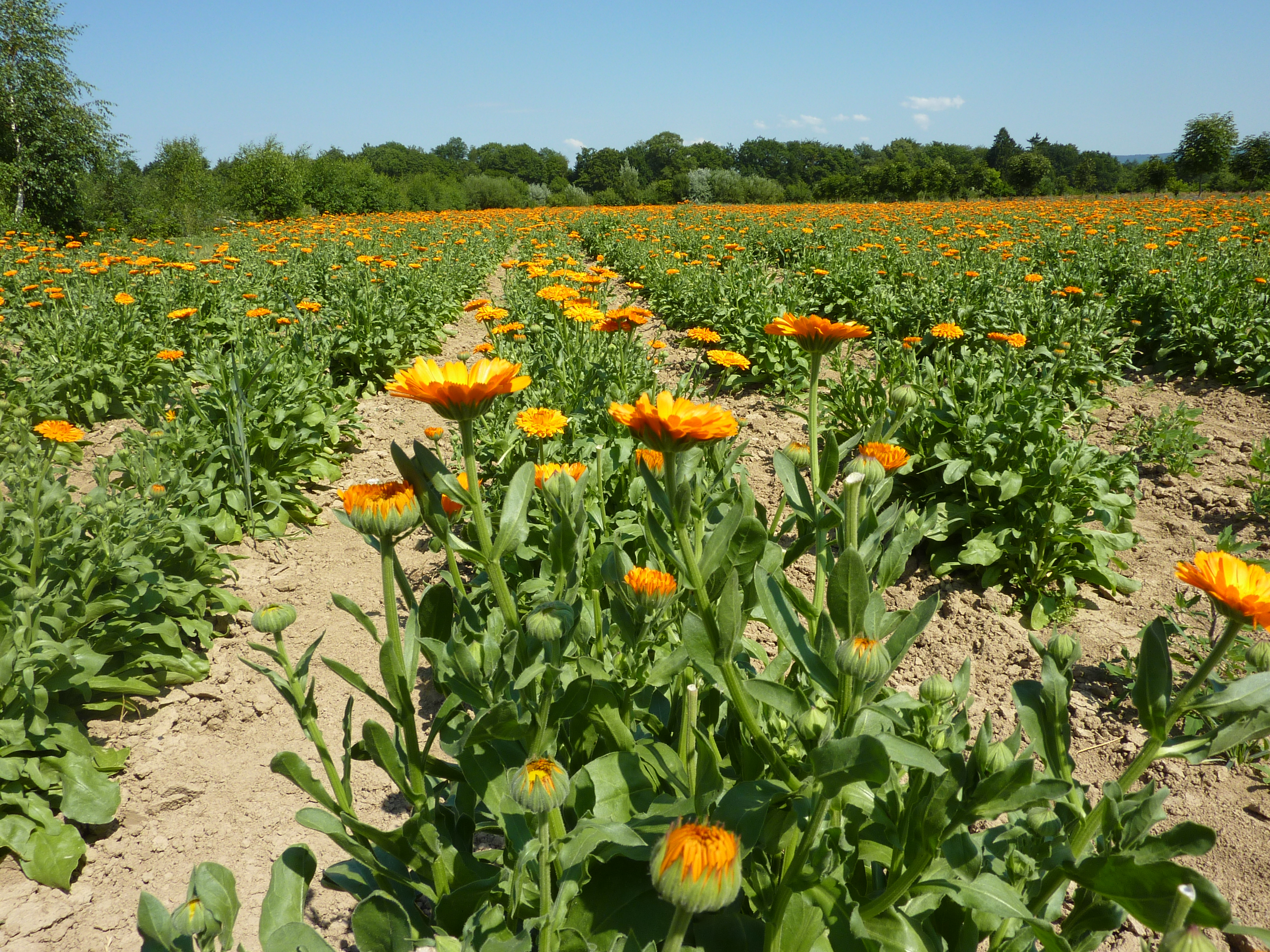 Calendula-Feld im Weleda-Heilgarten Schwäbisch Gmünd